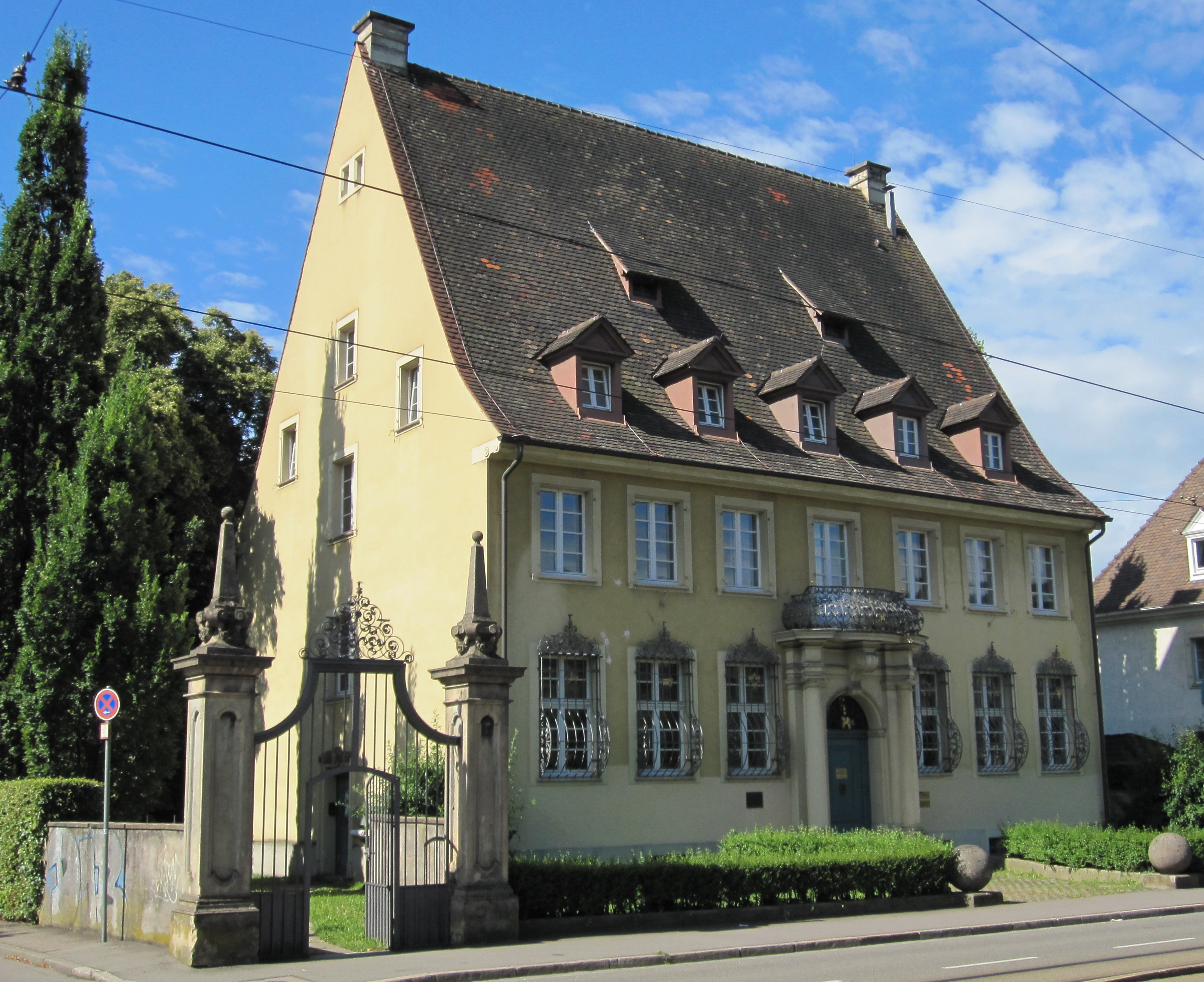 Building by Carl Anton Meckel (* June, 3rd. 1875 Frankfurt/Main; † December, 2nd. 1938 Freiburg/Breisgau), Seitliche Ansicht. Haus Badische Heimat (Freiburg im Breisgau). Geschäftsstelle Muettersproch-Gsellschaft.